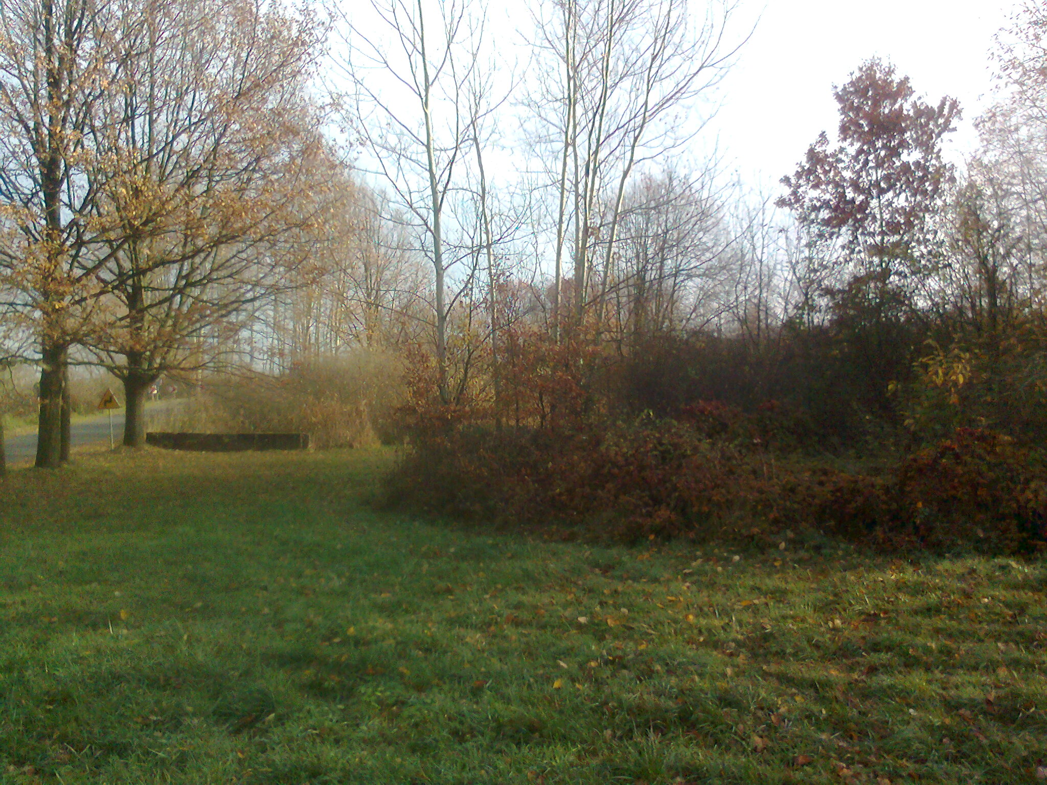 Miejsce dyslokacji 220 strażnicy WOP Pomonowice